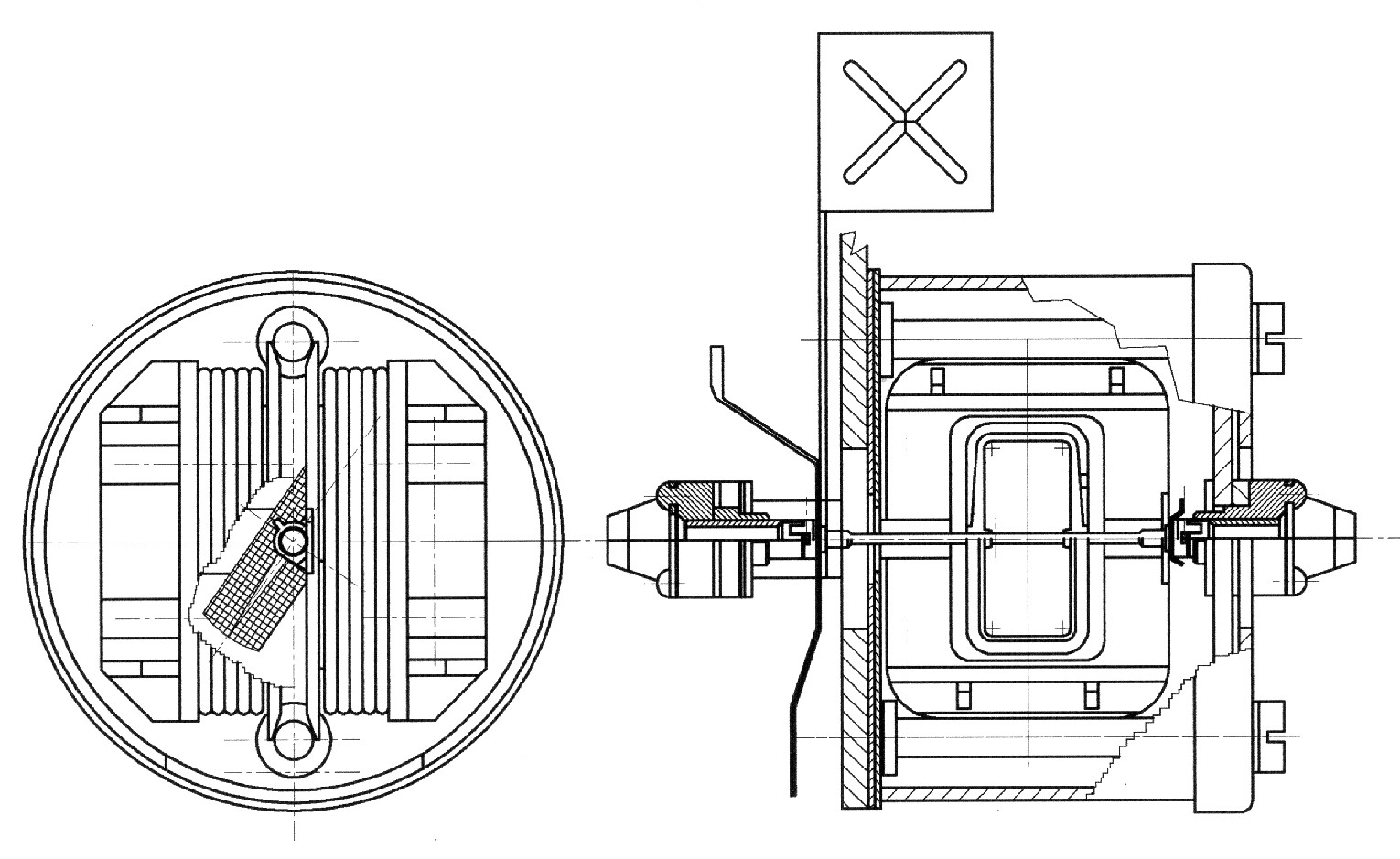 Feszített szálas elektrodinamikus műszer levegő csillapítással